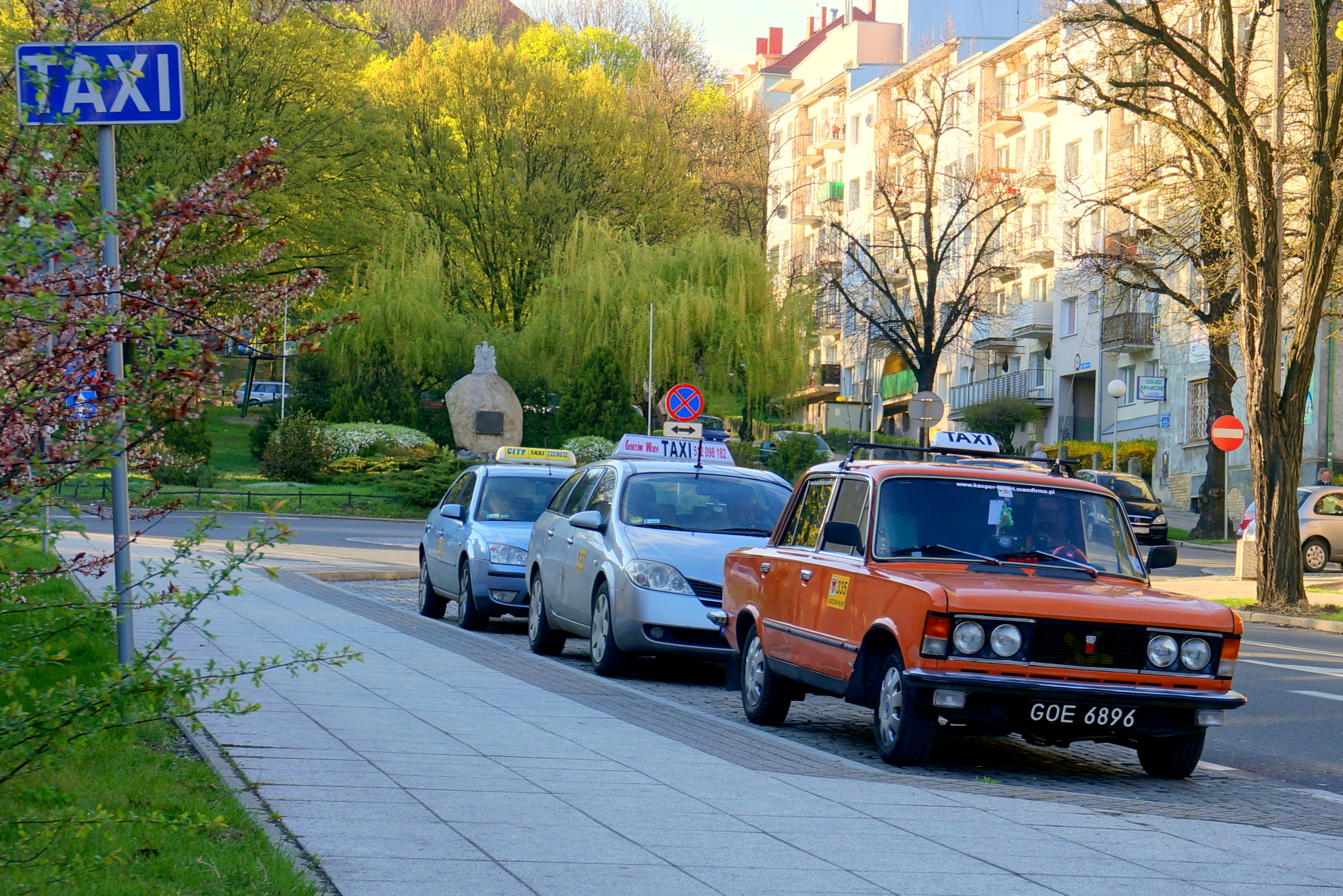 Polski Fiat 125p eksploatowany jako taksówka w 2014 r. Postój taksówek w Gorzowie Wlkp., ul Orląt Lwowskich.